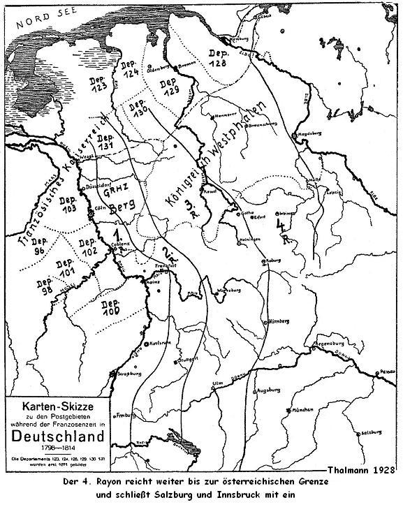 Karte der Rayon-Bezirke von 1802